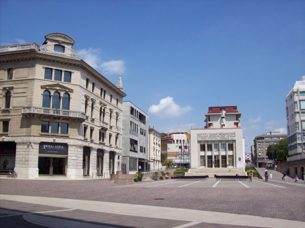 Pordenone-Piazza XX Settembre